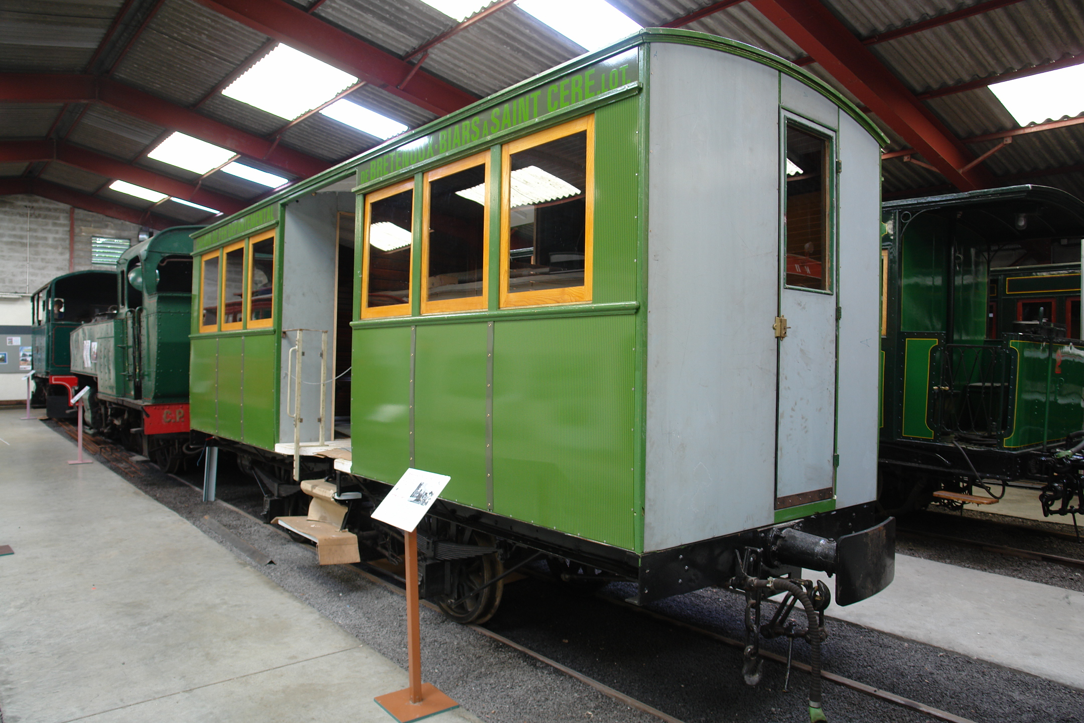 Voiture B2 de Tramway du Quercy (Chemin de fer de Bretenoux-Biars a St-Cere)